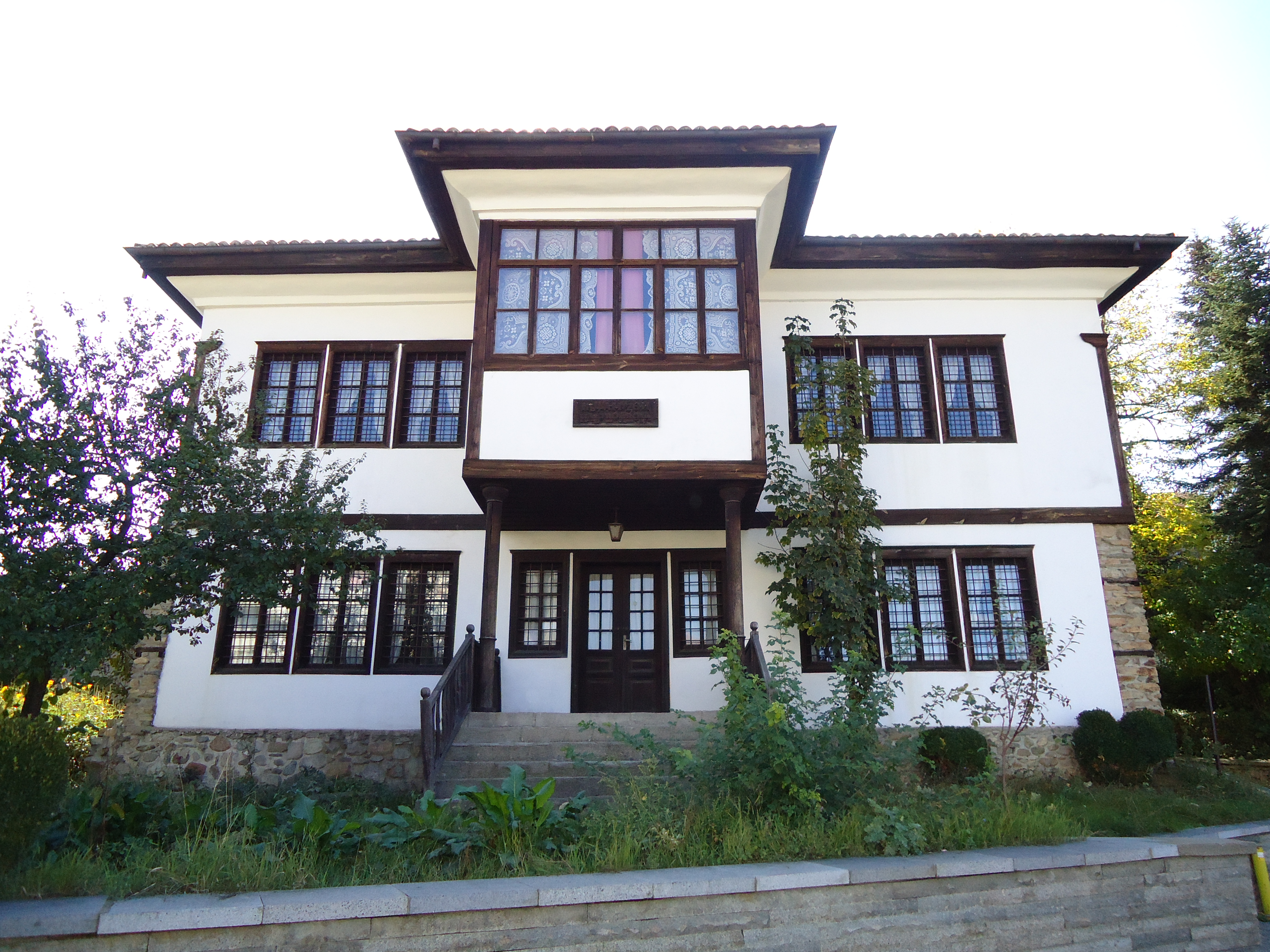 Къщата на Ильо войвода в гр.Кюстендил